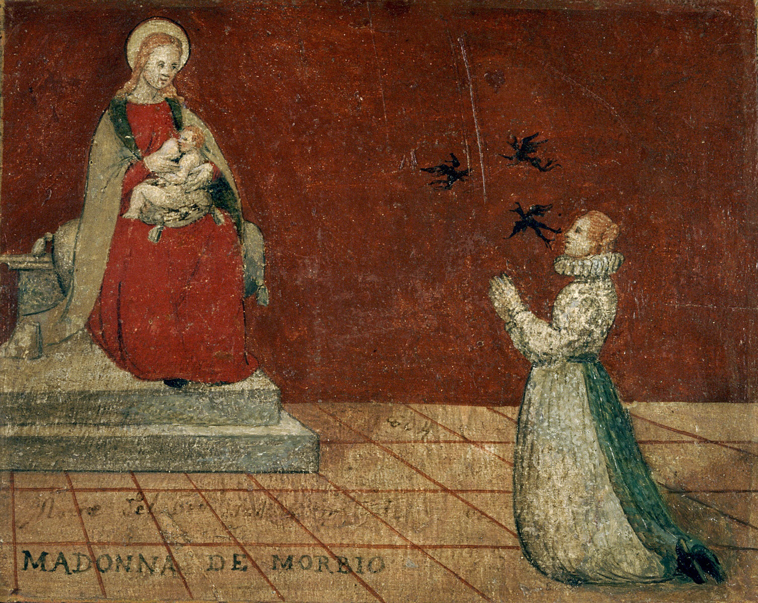 Museum Kloster Asbach (Zweigmuseum des Bayerischen Nationalmuseums); Sammlung Rudolf Kriss: Votivtafel aus Morbio Inferiore bei Mendrisio, Ölmalerei auf Holz, Tessin, um 1600